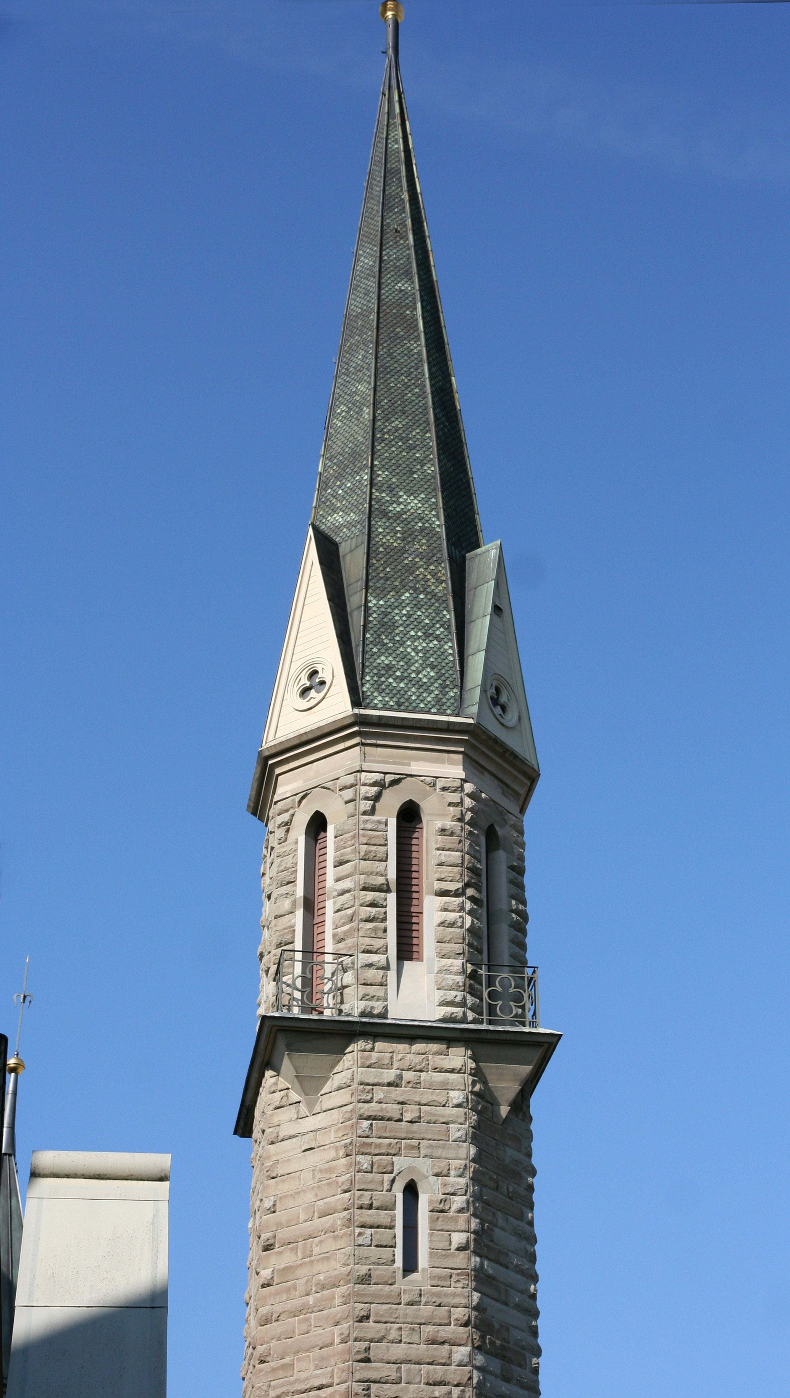 Römisch-katholische Pfarrkirche St. Stephan Männedorf